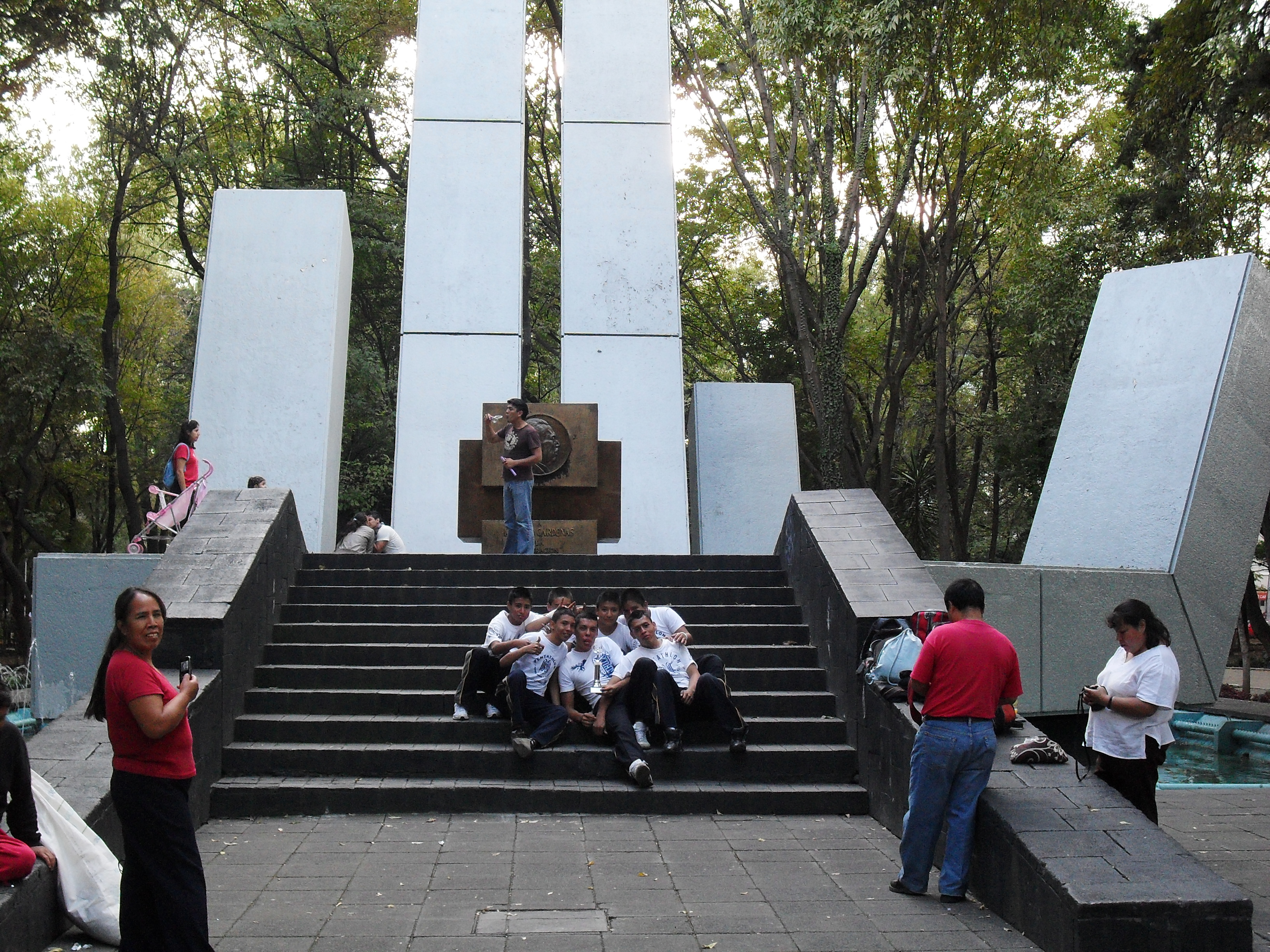 Monumento que se le hizo al General Lázaro Cárdenas donado por el pueblo español